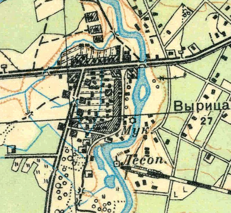 Топографическая карта Ленинградской области, квадрат О-36-13-Г-в (пос. Вырица), посёлок Вырица